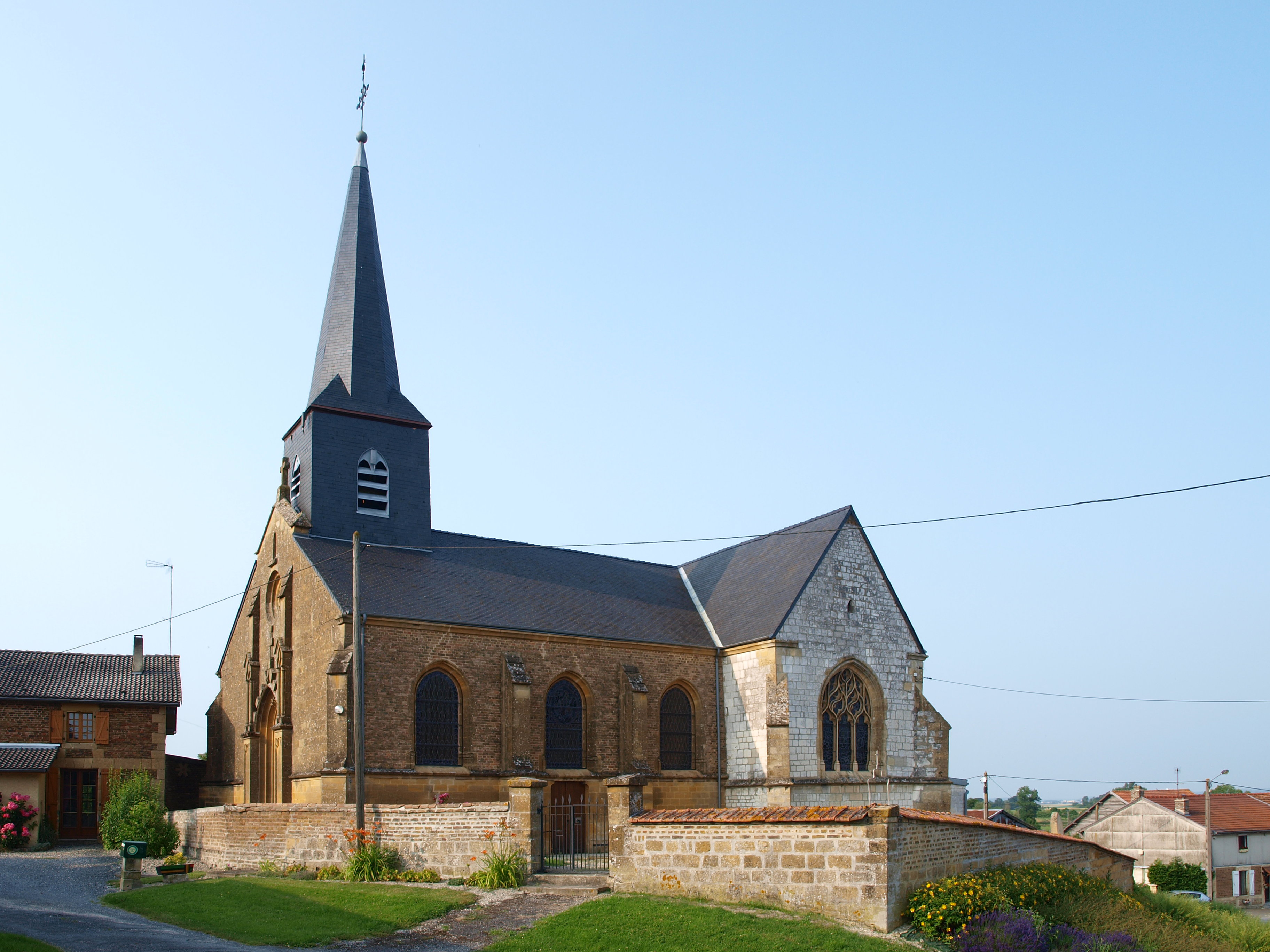 Contreuve (Ardennes, France) , église